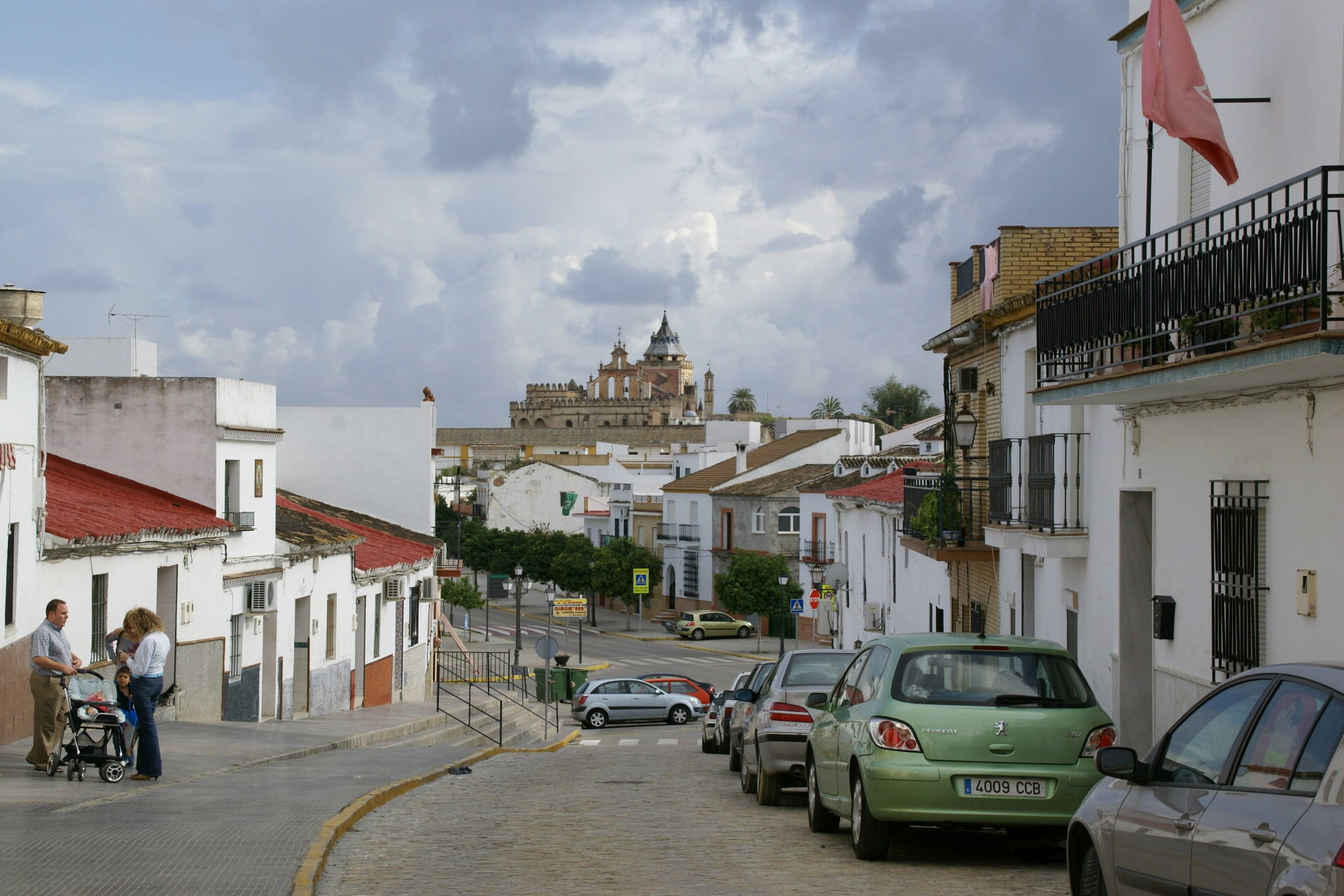 Monastery of San Isidoro del Camino, Santiponce (Sevilla), Spain